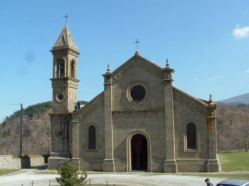 Vista generale della Pieve di Santa Maria a Lamula.